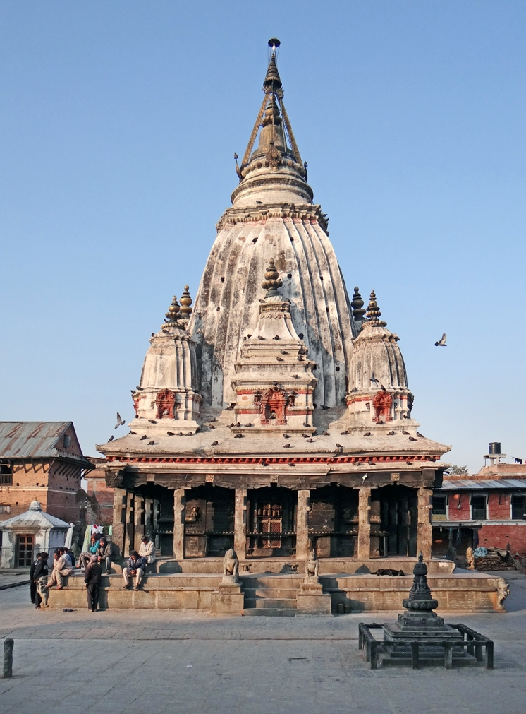 Bungamati est un village newar, d'allure médiévale mais datant du XVIème siècle. Situé dans la vallée de Katmandou, il est construit sur une colline au sommet de laquelle se trouve un temple important dédié à Rato Machhendranath, le dieu tutélaire de Patan. Les habitants vivent de l'agriculture mais également de l'artisanat (sculpture sur bois). Article de Wikipedia sur Bungamati